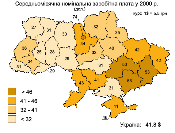 Середня заробітна плата у регіонах України у 2000 р., дол. США